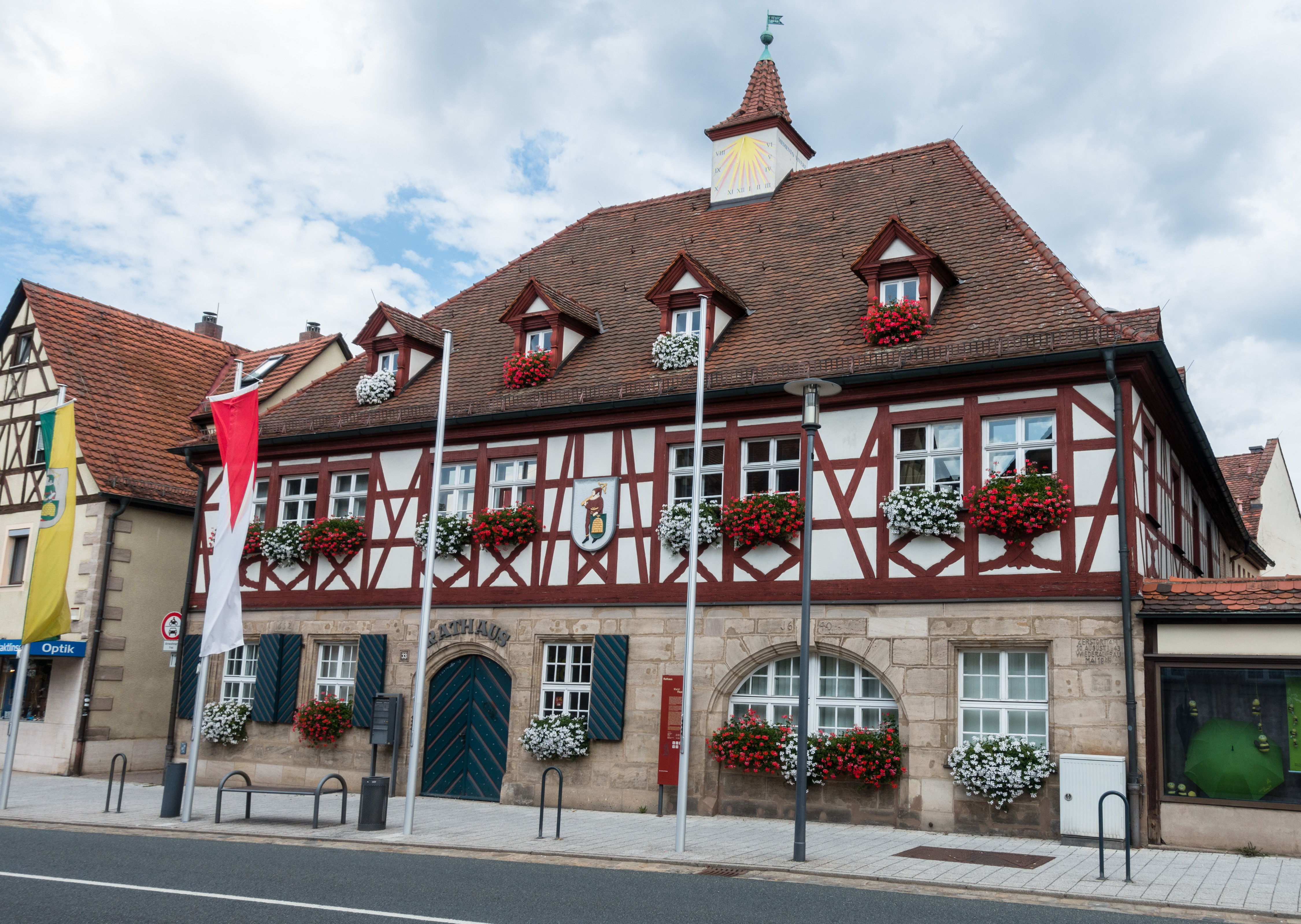 Rathaus, Feucht, Ansicht von Süden, Baudenkmal